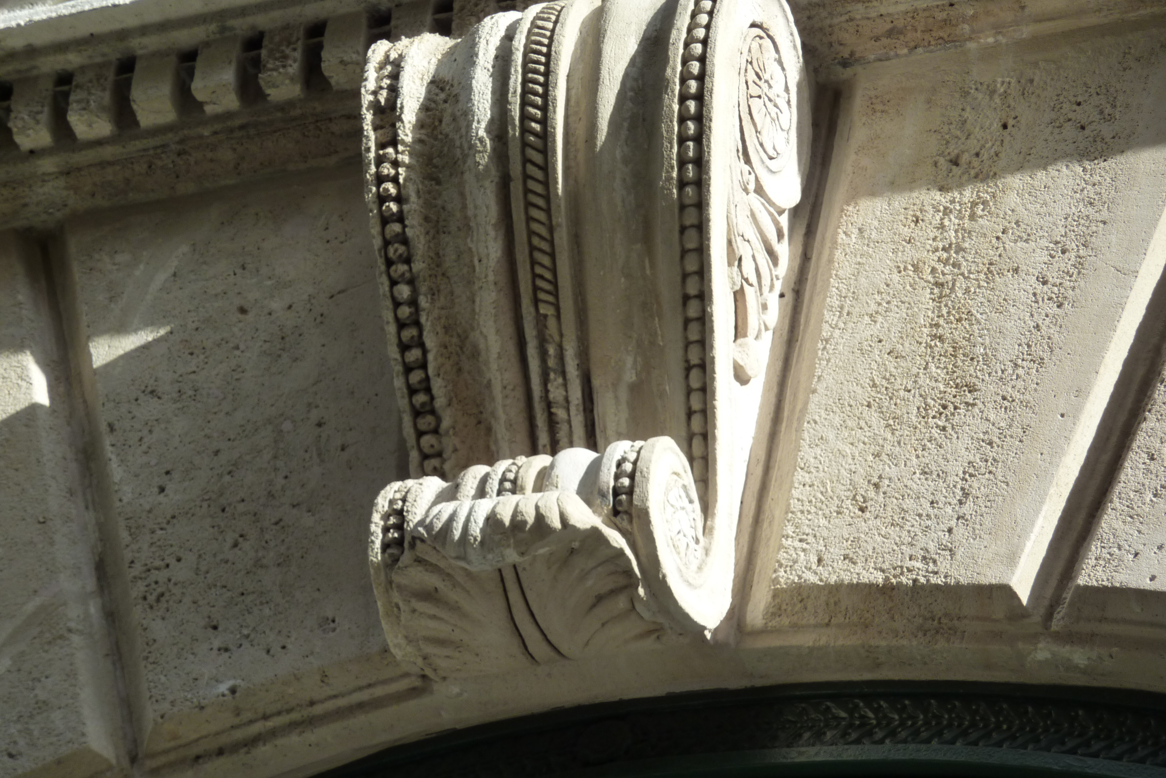 Gesims und Agraffe an der Fassade des Hauses 4, rue d'Aboukir in Paris (2. Arrondissement), Architekt: Jules de Joly